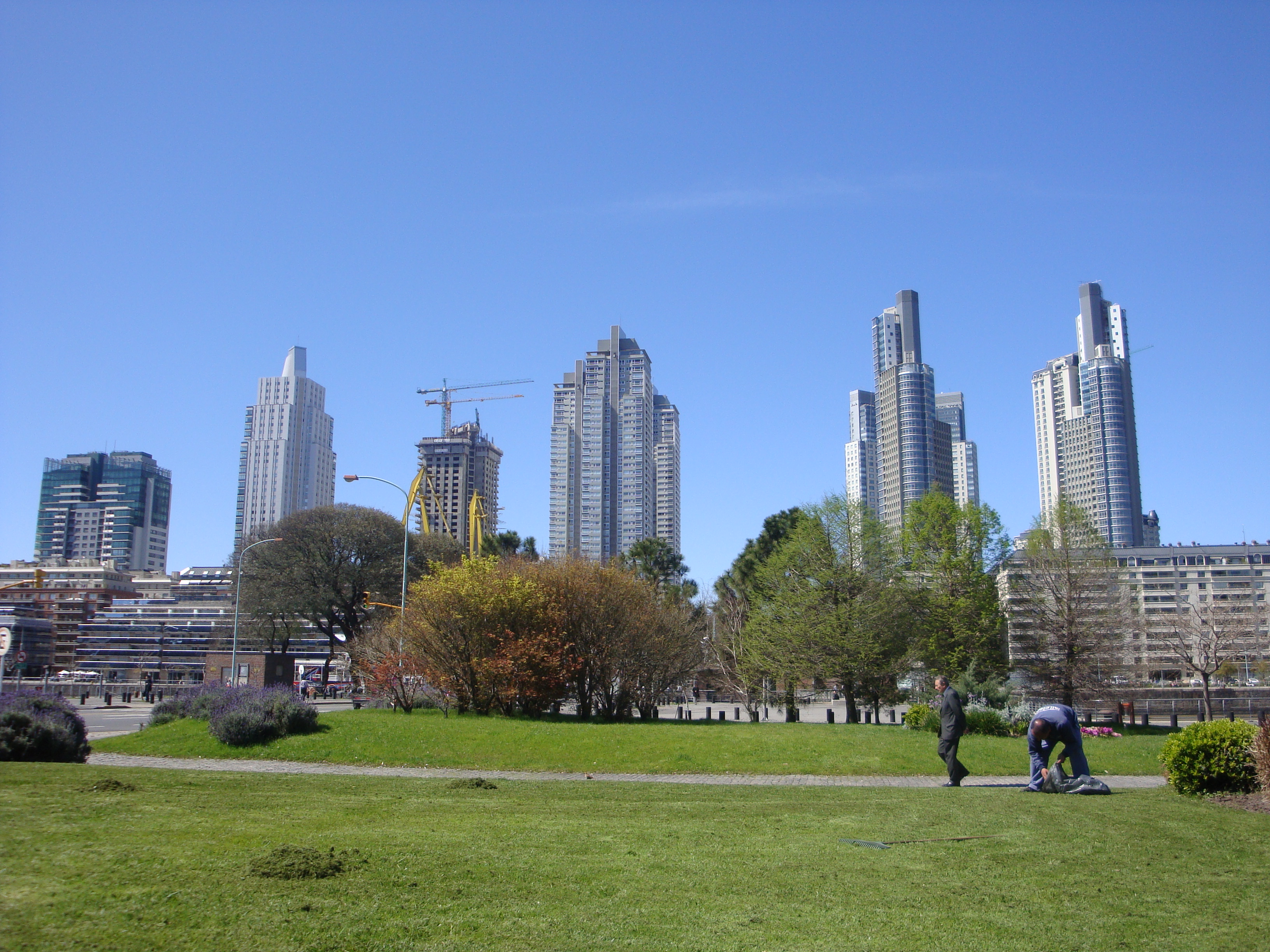 Edificios de Puerto Madero, vistos desde los jardines de la UCA.